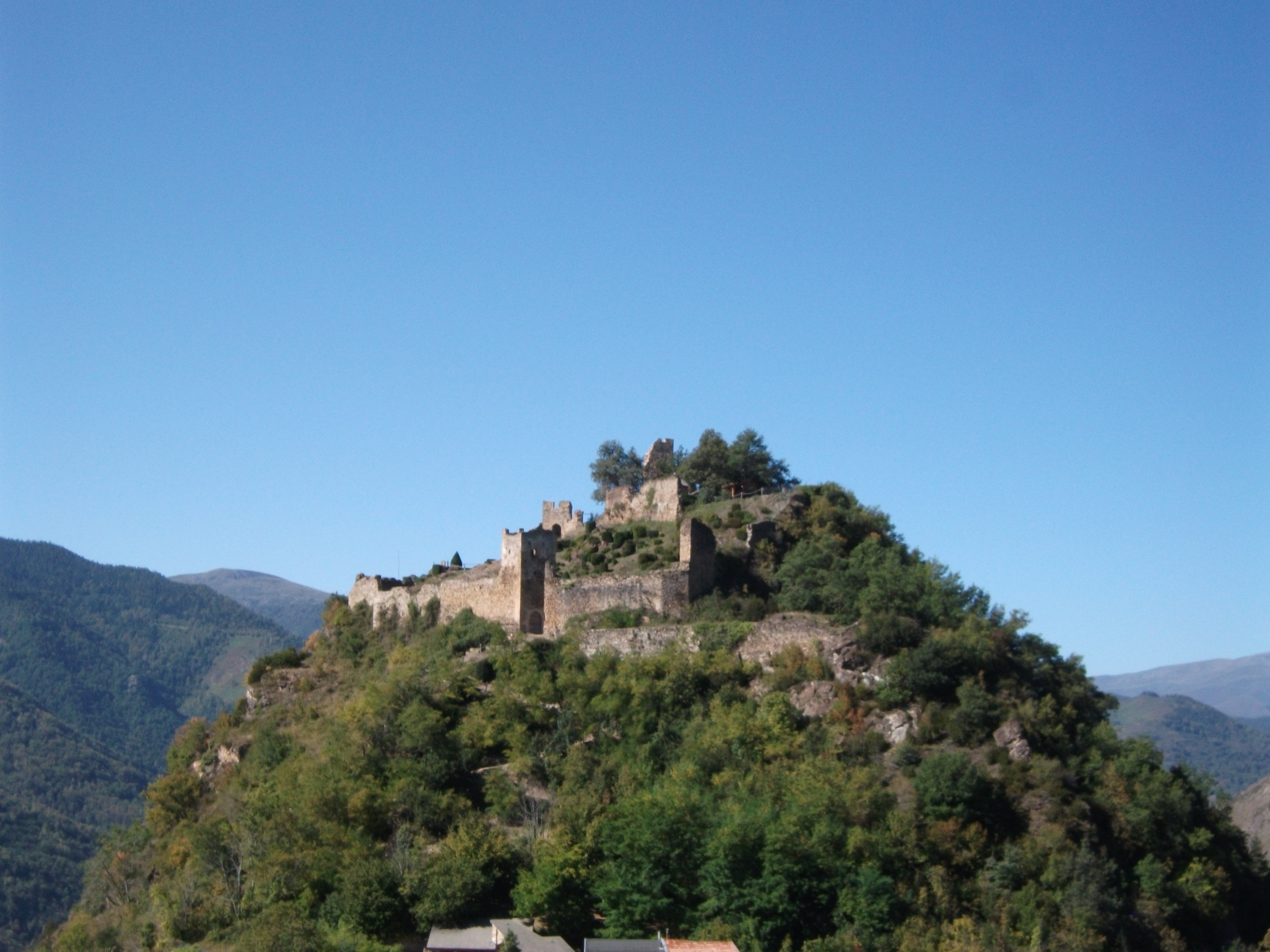 Un des plus beaux châteaux cathares d'Ariège.